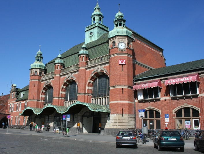 Bahnhofsgebäude des Lübecker Hauptbahnhofes